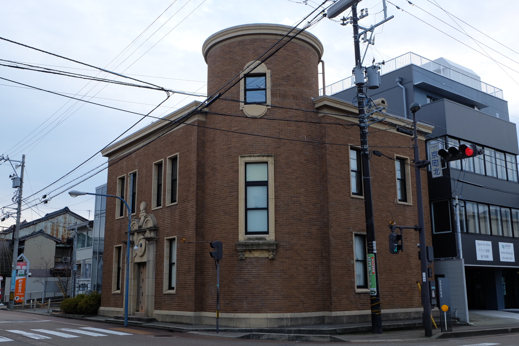 旧石川商銀信用組合小松支店の外観